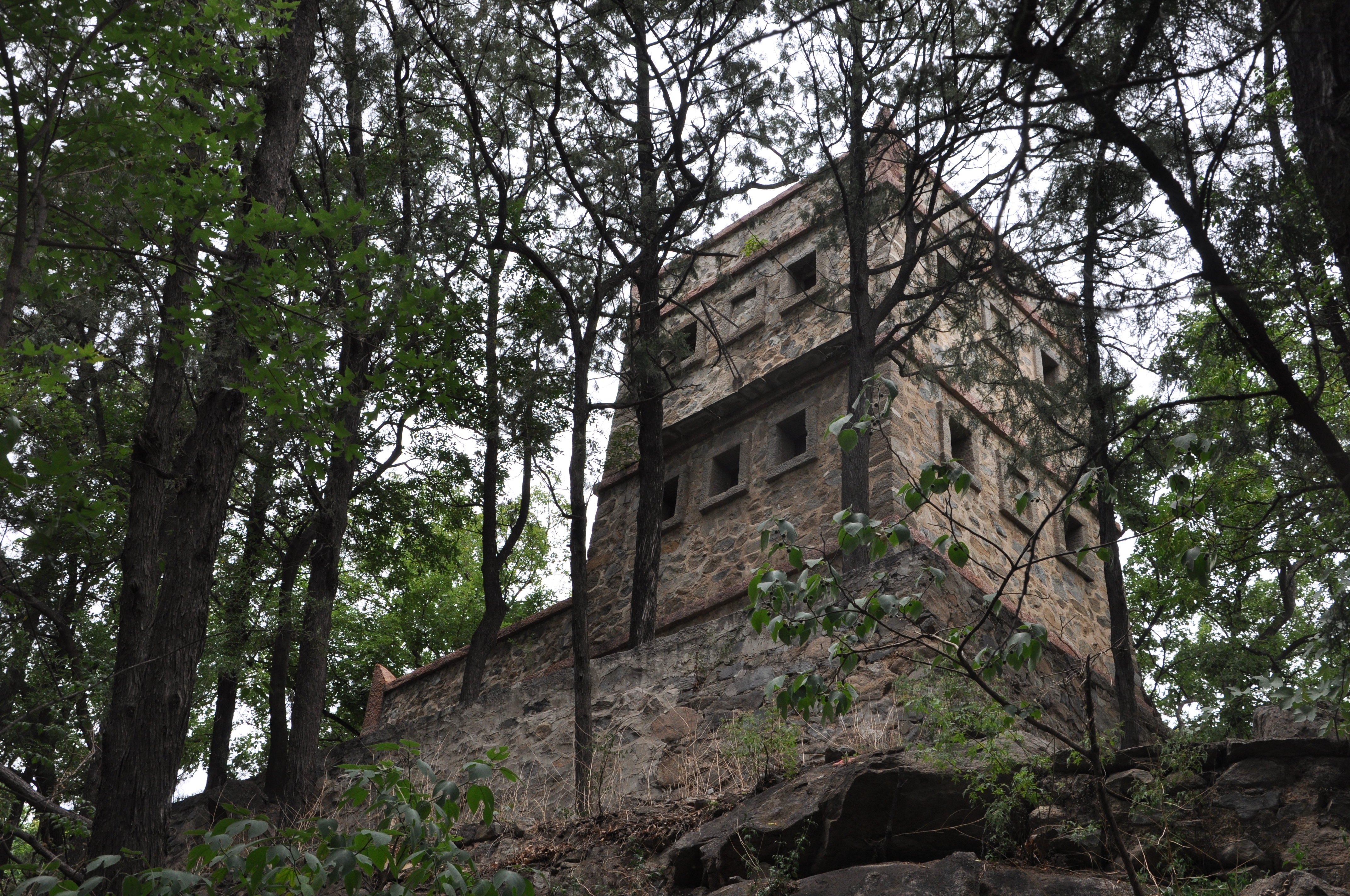 贝家花园碉楼的侧后方，碉楼现在置身于山林中。